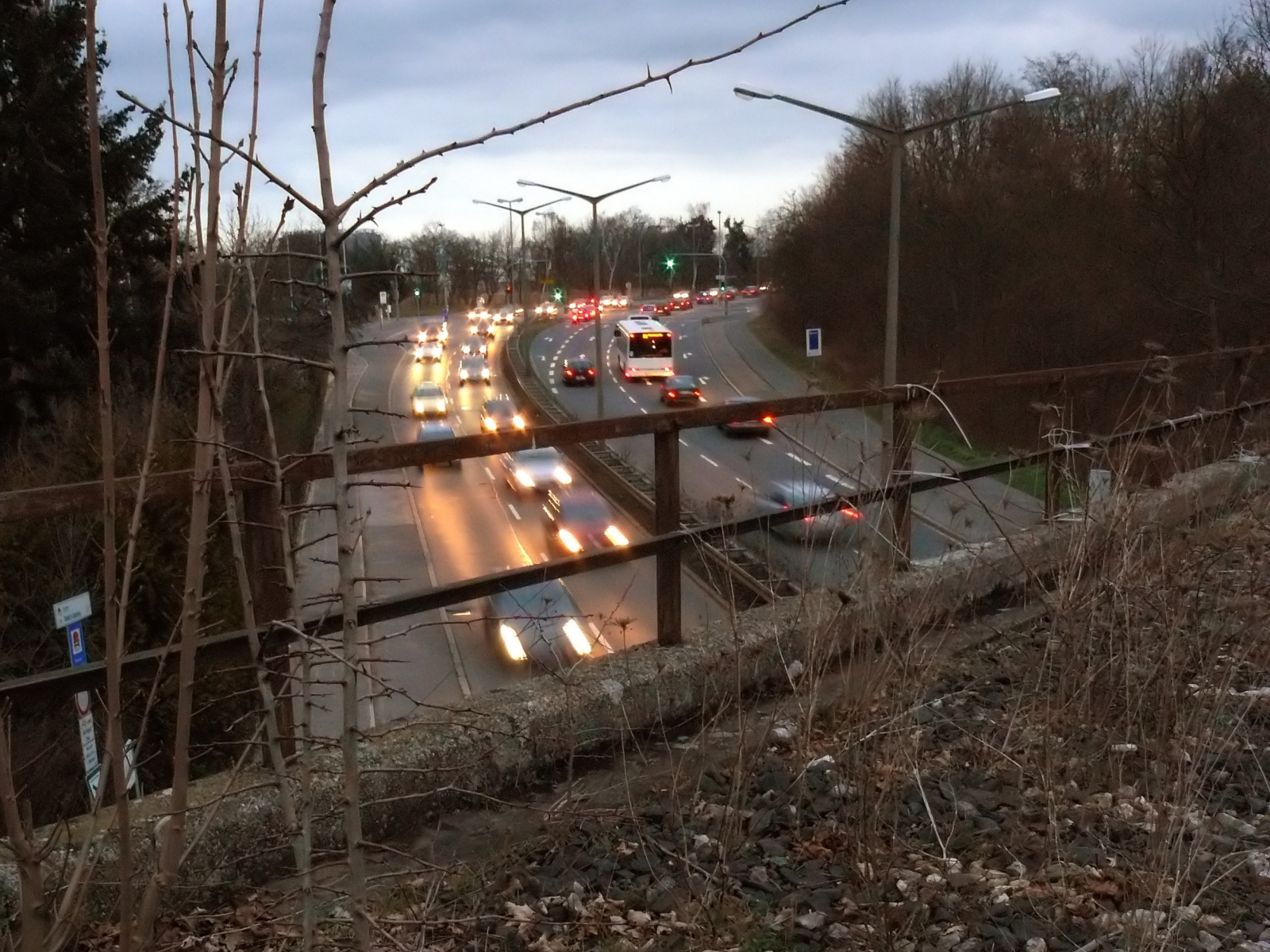 Rothenburger Straße in Nürnberg in Richtung Kreuzung "Fürth Süd" (Schwabacher Straße (Fürth) und Gebersdorfer Straße (Nürnberg)) von der Brücke der Bibertbahn.49°26′11″N 10°59′32″E / 49.436343688519°N 10.992312400115°E